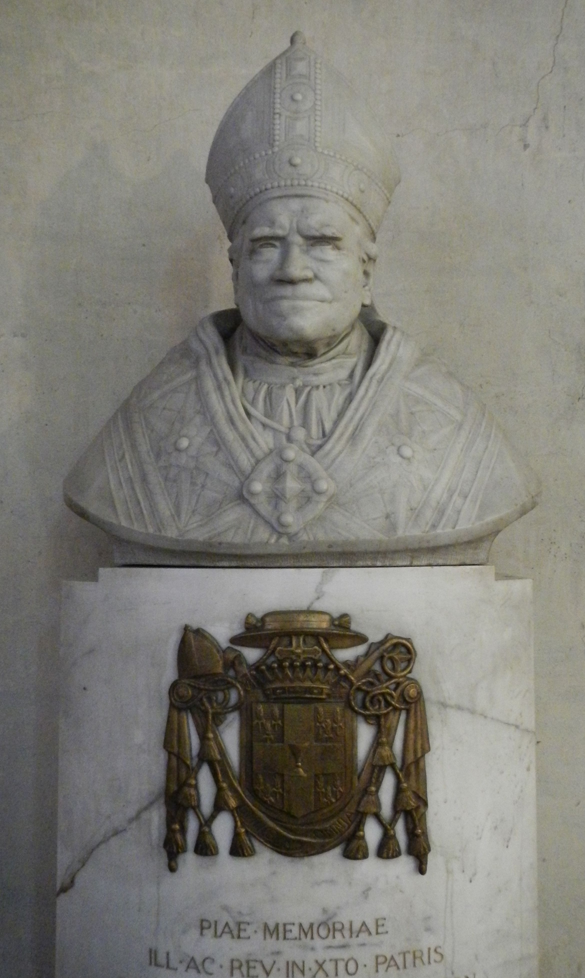 Büste des Papstes Pius VI in der Kathedrale von Valence.